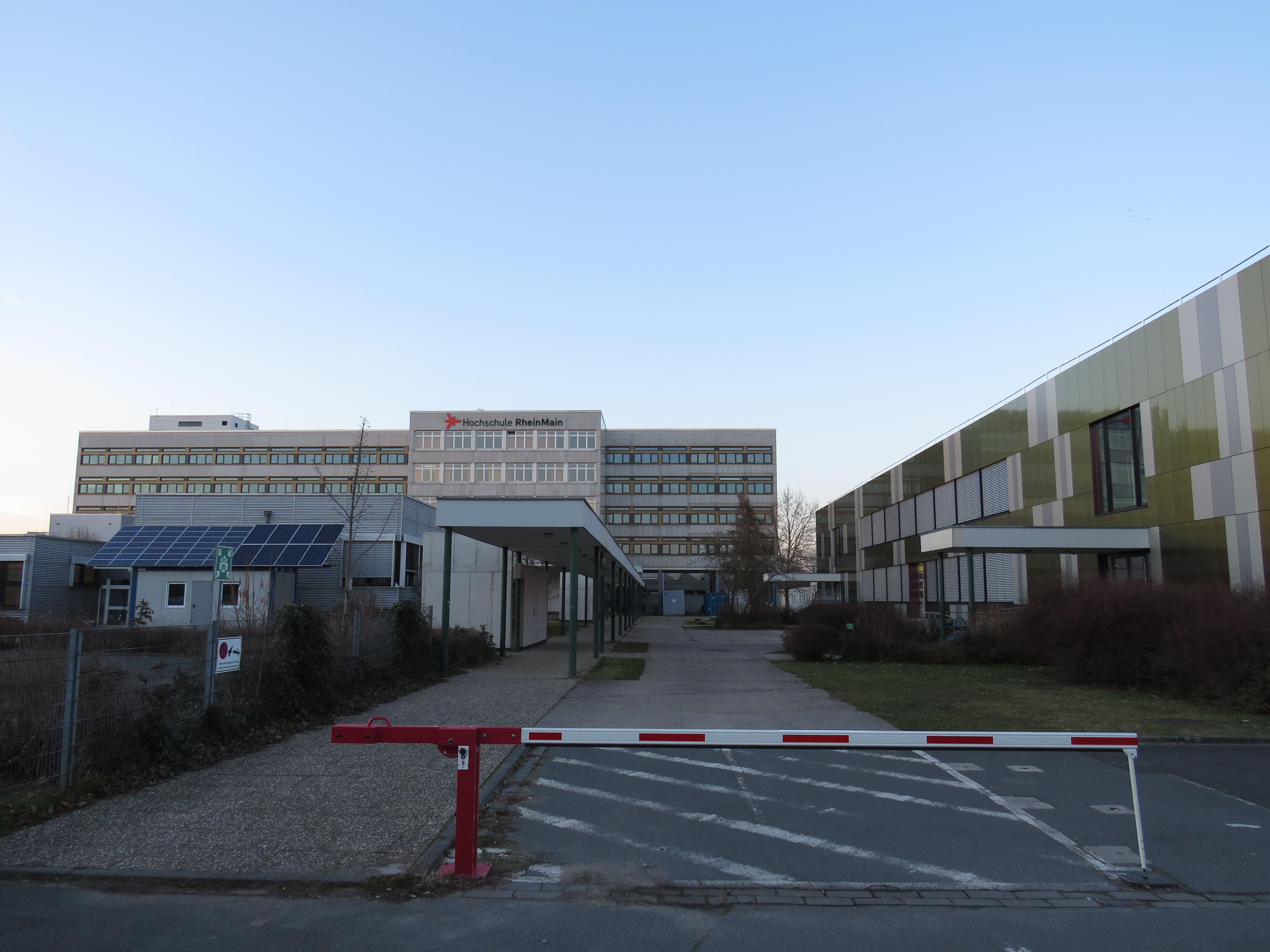 Ansicht des Campus "Am Brückweg" der Hochschule RheinMain in Rüsselsheim.